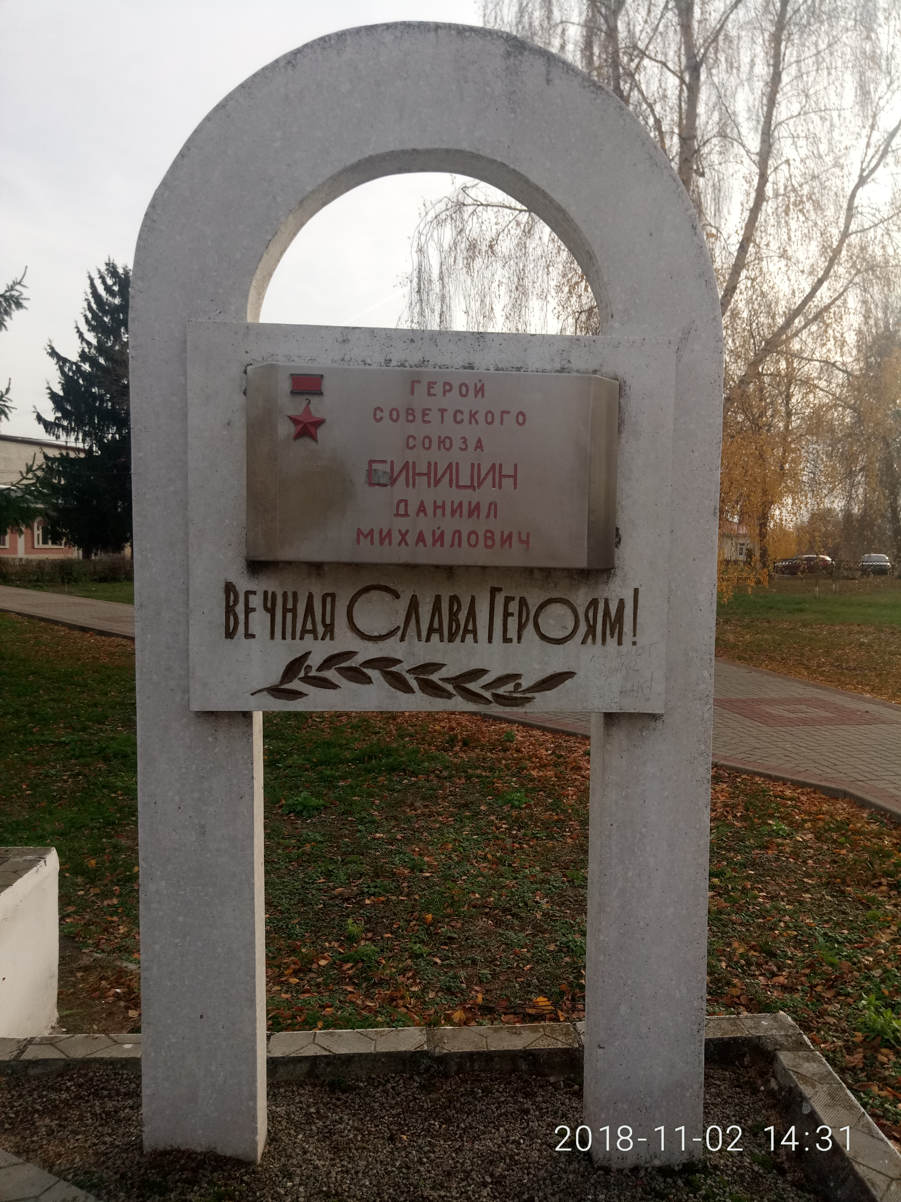 Д.М.Синицин